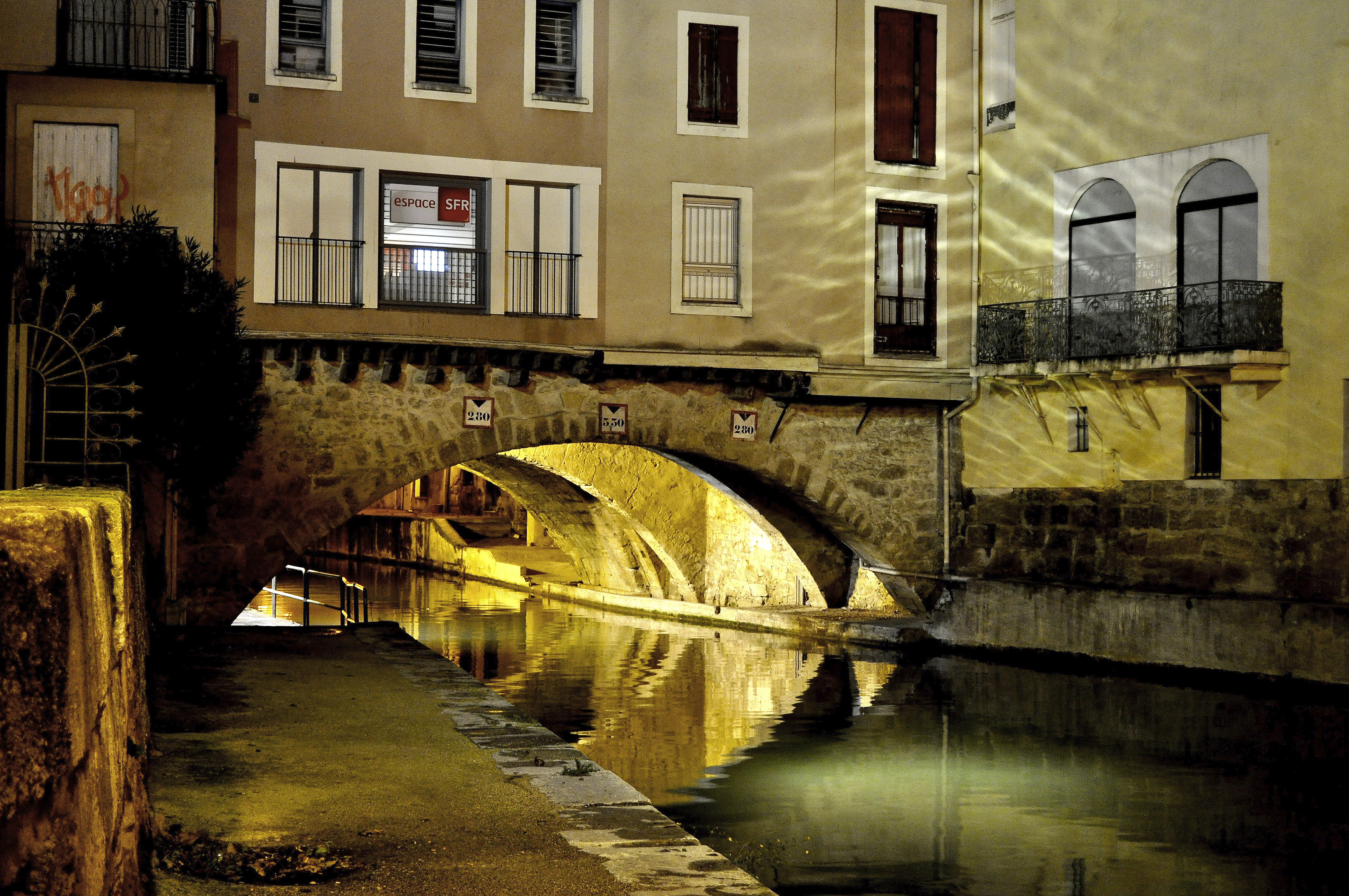 Pont des marchands de bas